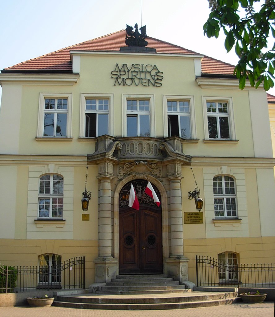 Akademia Muzyczna w Bydgoszczy